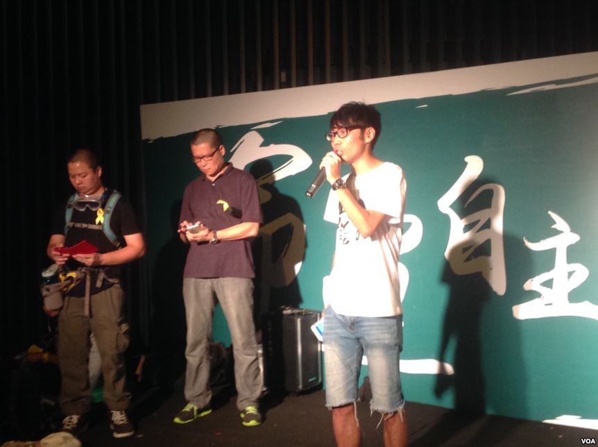 中文（台灣）: 和平佔領中環行動星期天淩晨正式啟動